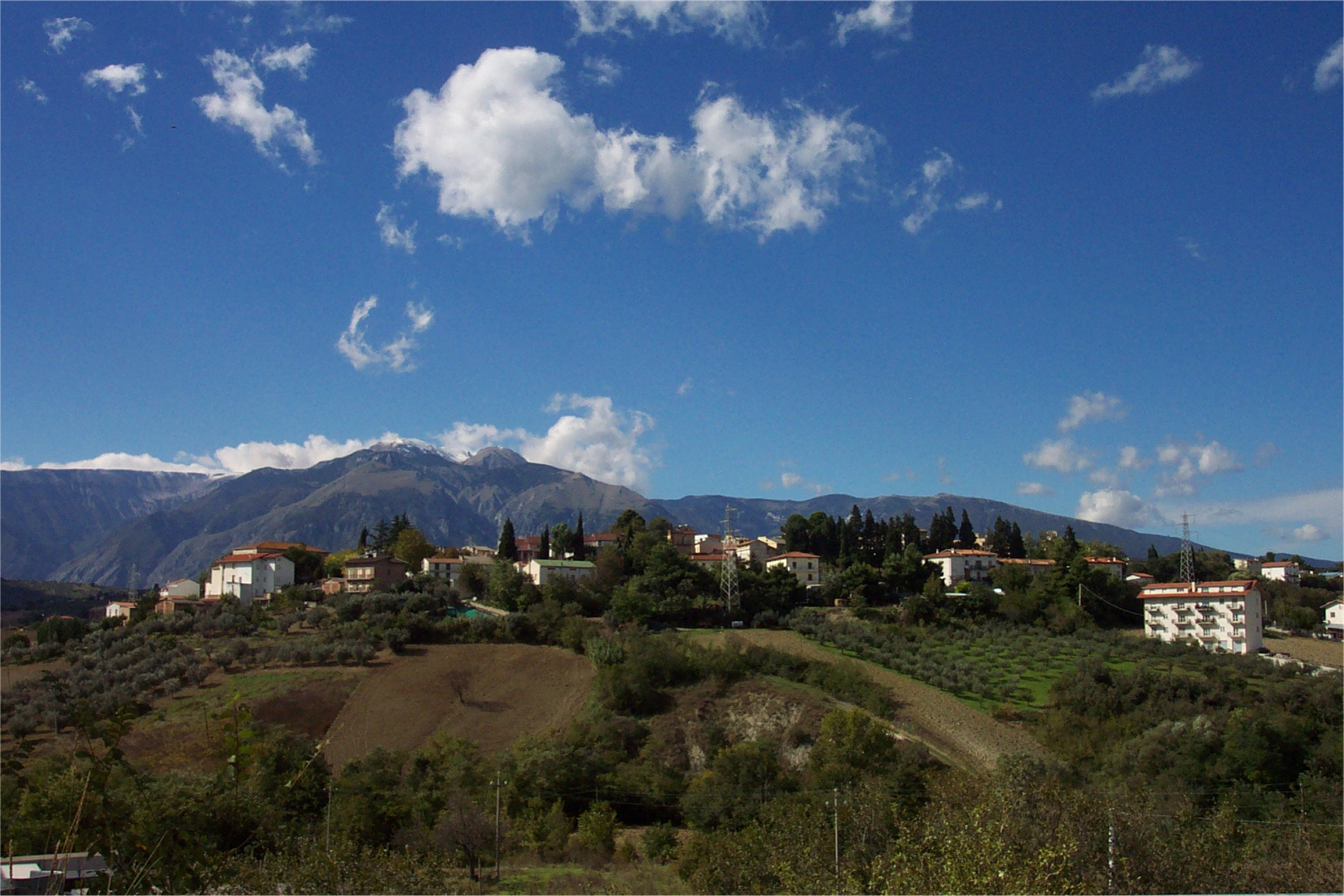 Panorama da contrada Santa Lucia